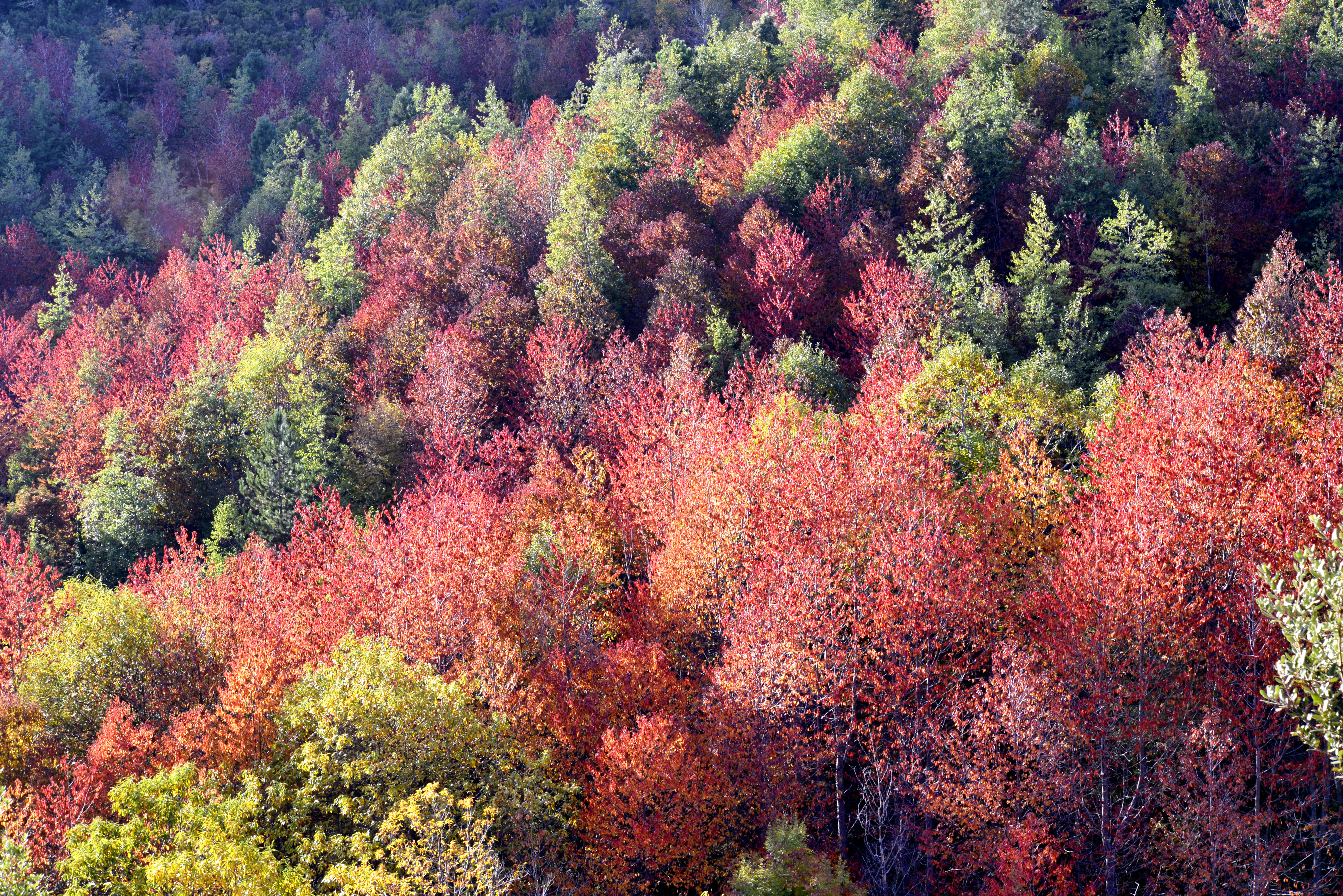 Tavera, Gravona (Corse) - Couleurs d'automne sous les flancs méridionaux du col de Scalella